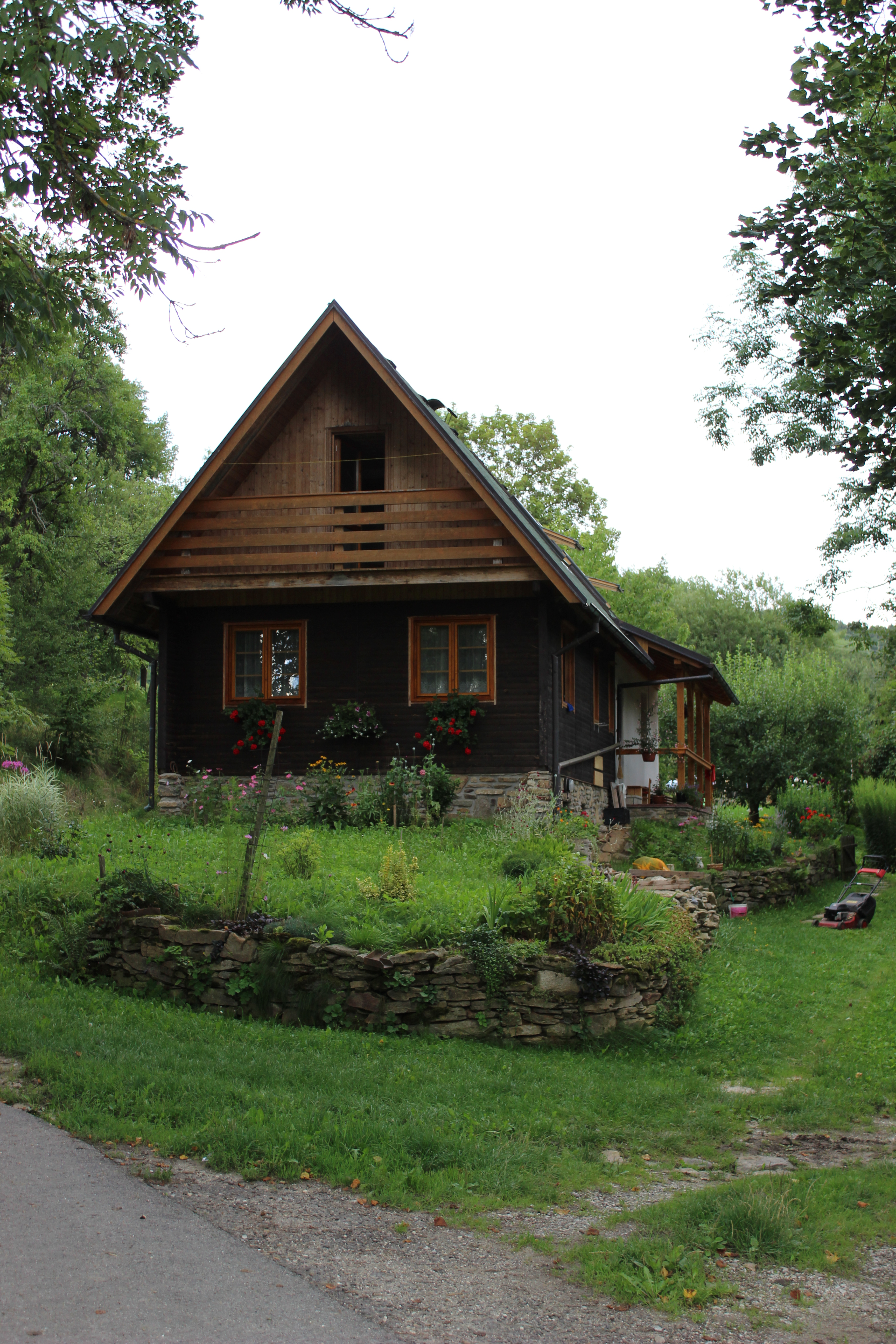 Dům evidenční číslo 2 v Kojšicích, části Petrovic u Sušice.